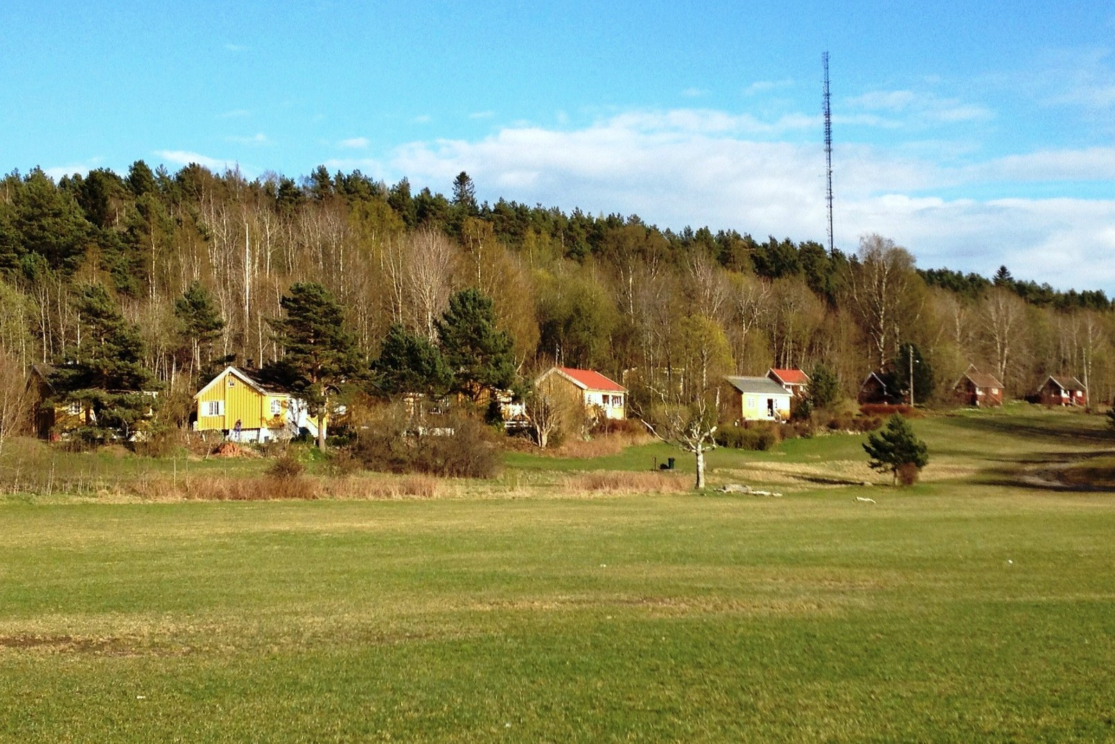 Brannfjellet, høydedrag over Ekebergsletta i forgrunnen. Oslo.